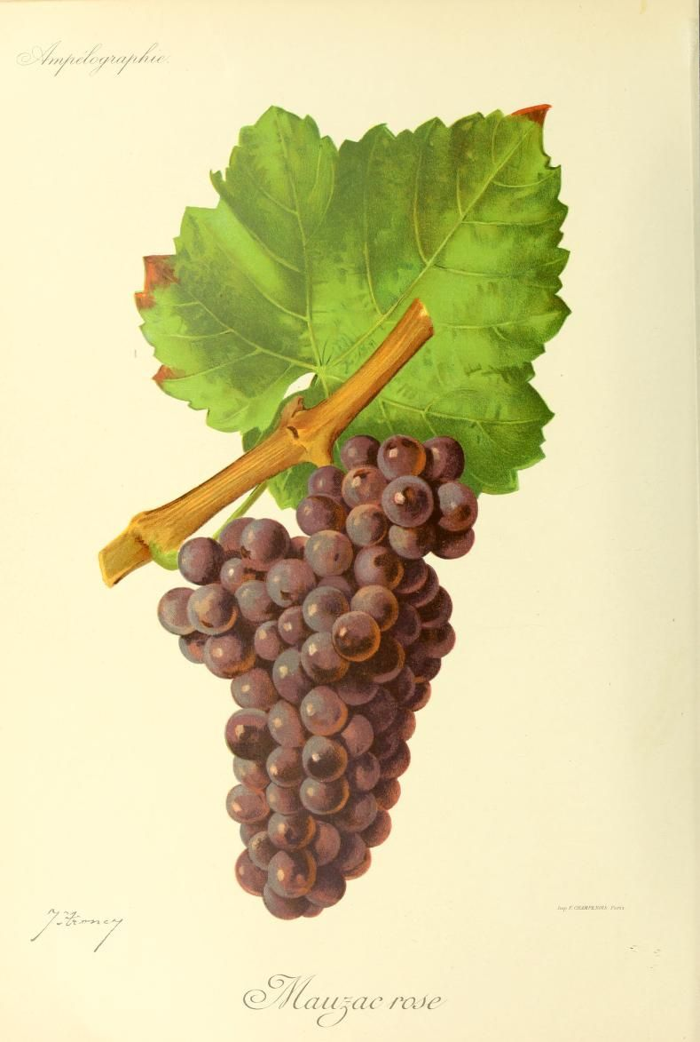 Illustration du cépage Mauzac rose par Jules Troncy dans l'ouvrage "Ampélographie : traité général de viticulture" publié sous la direction de P. Viala & V. Vermorel avec la collaboration de A. Bacon, A. Barbier, A. Berget [et al.] - Date de l'édition originale : 1901-1910